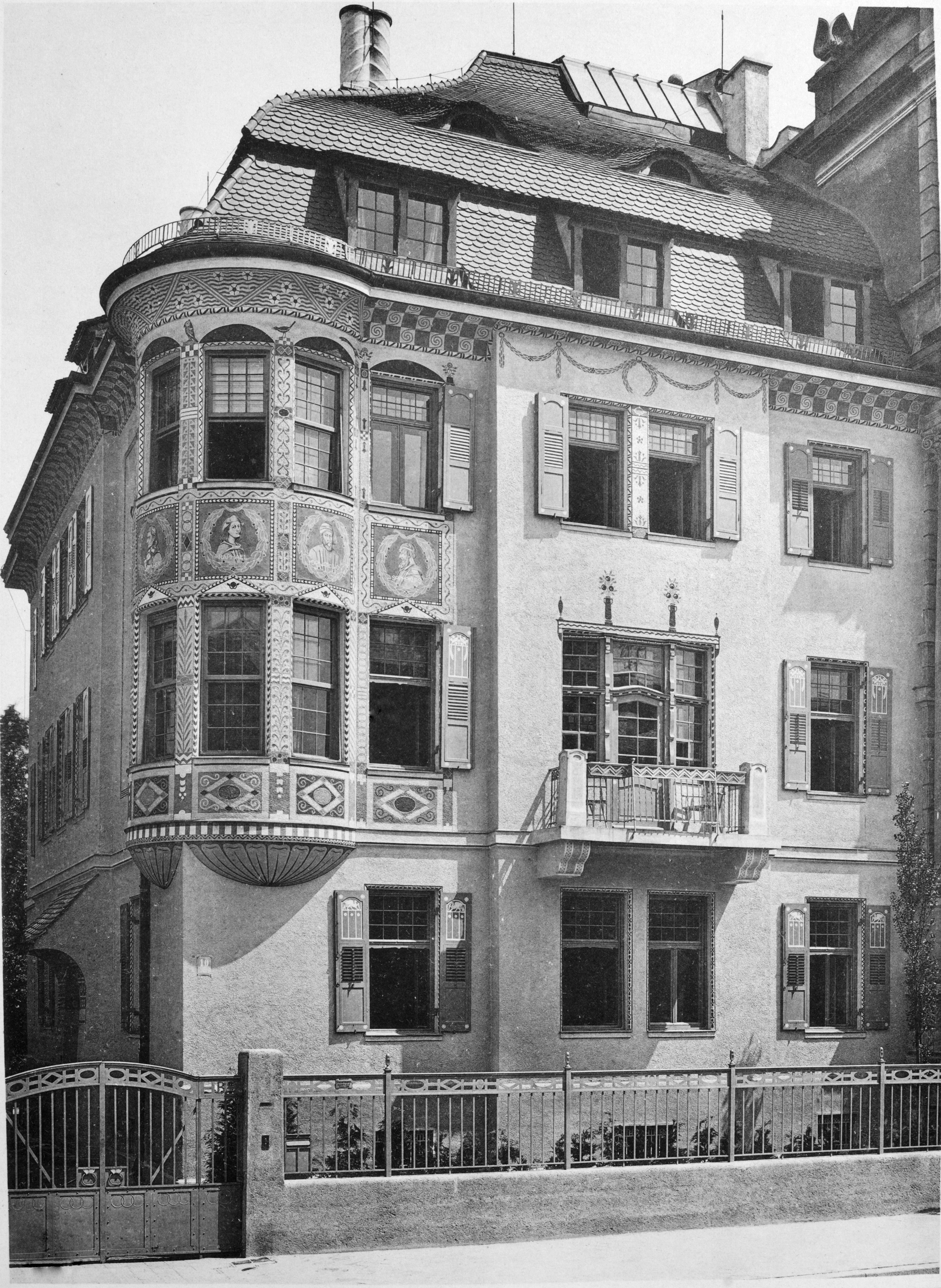 München. Fassadenansicht, Georgenstraße 10. Palais Bissing.